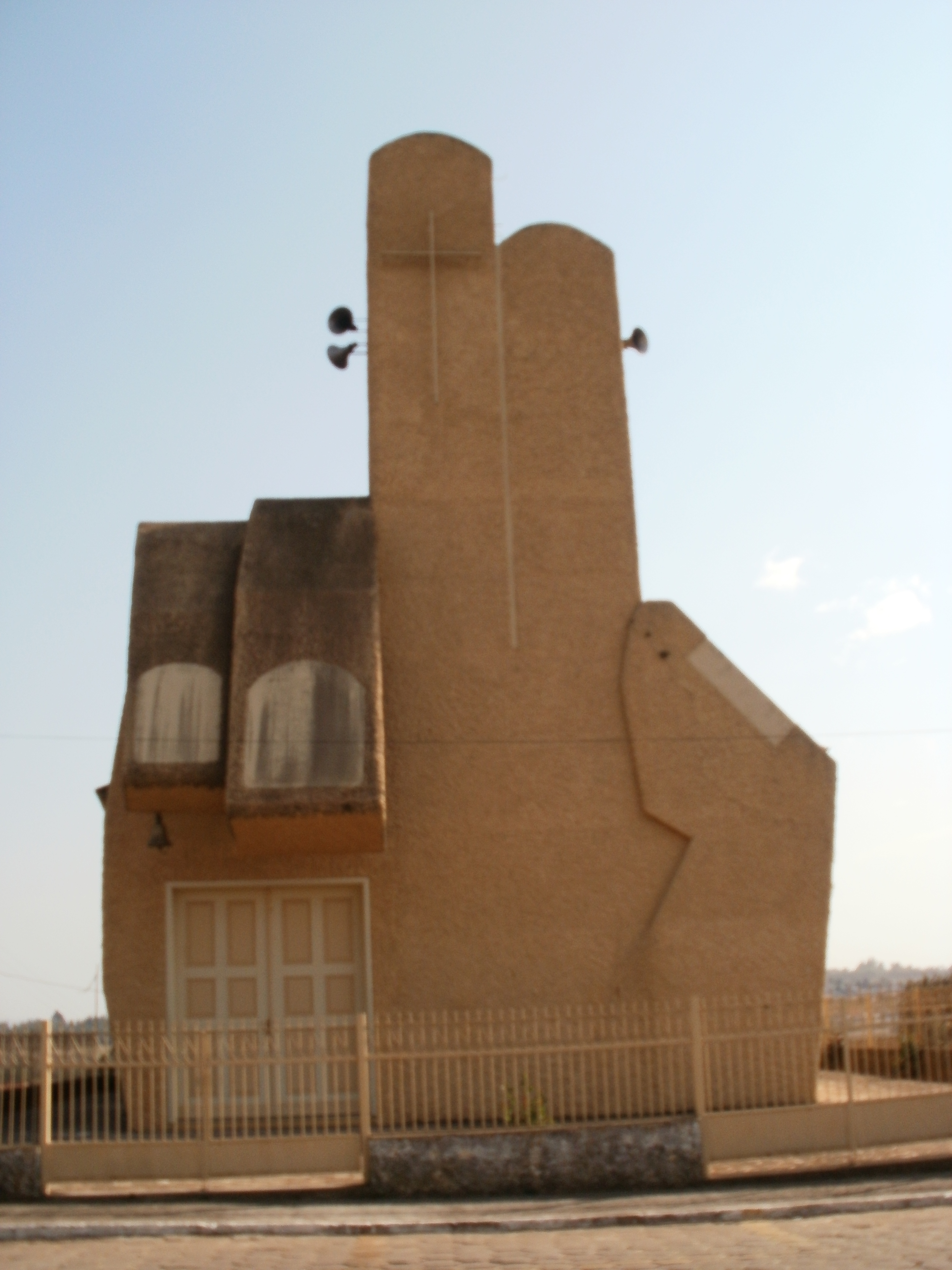 Igreja situada na Praça Dr. Simplício Dias do Nascimento, no bairro Areão, Andrelândia-MG.